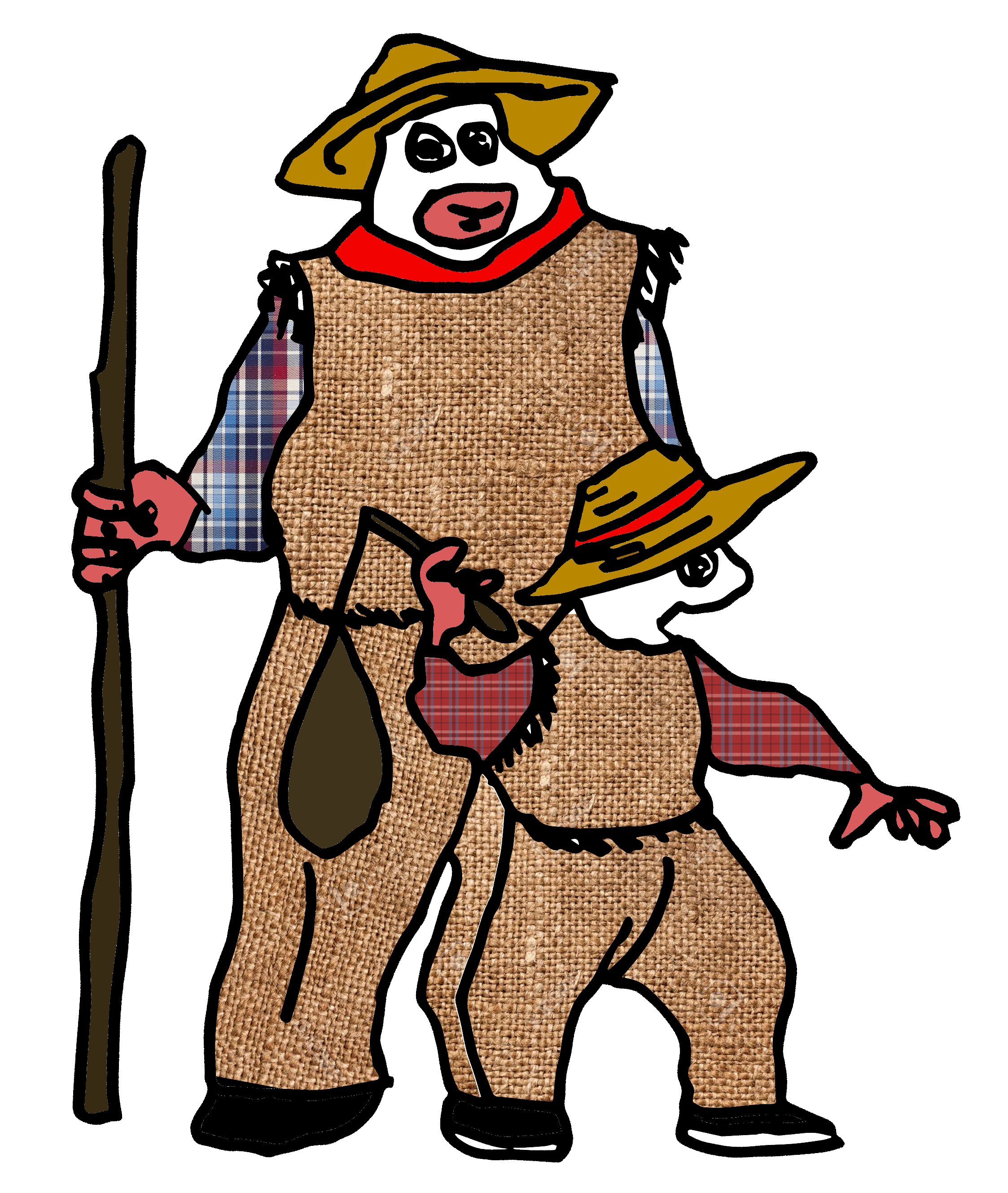 Lesakako zakuzaharren ilustrazioa